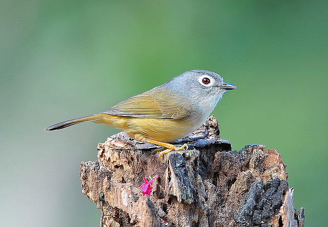 Gray-cheeked Fulvetta (Alcippe morrisonia)